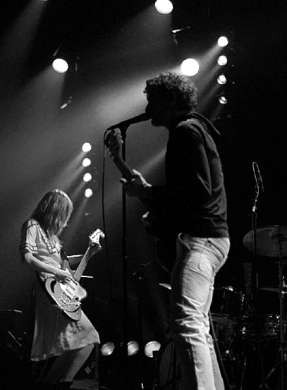 Blonde Redhead live in de Botanique, Brussel. Eigen foto.